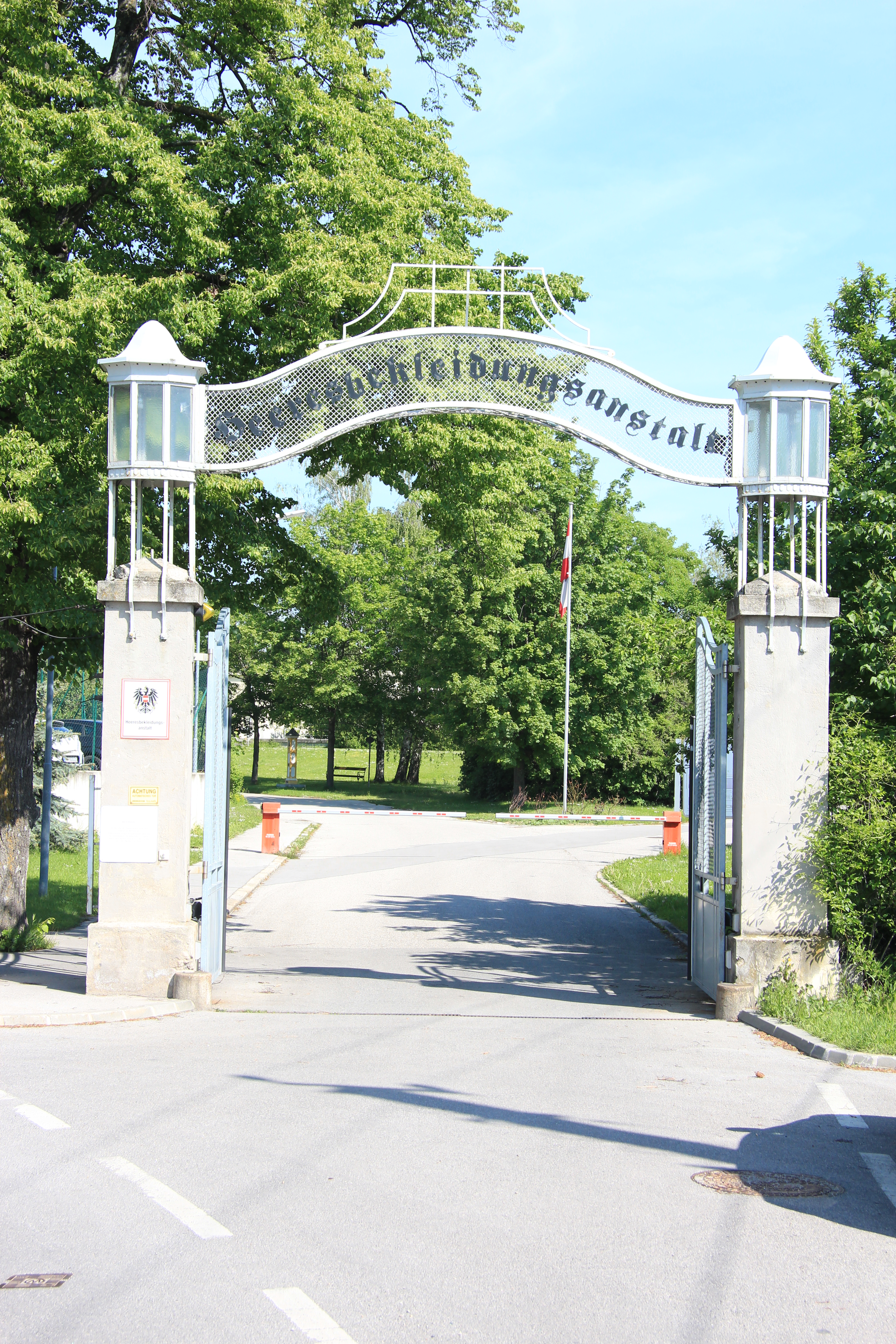 Sicherheitszentrum in Brunn am Gebirge, Niederösterreich, Heeresbekleidungsanstalt